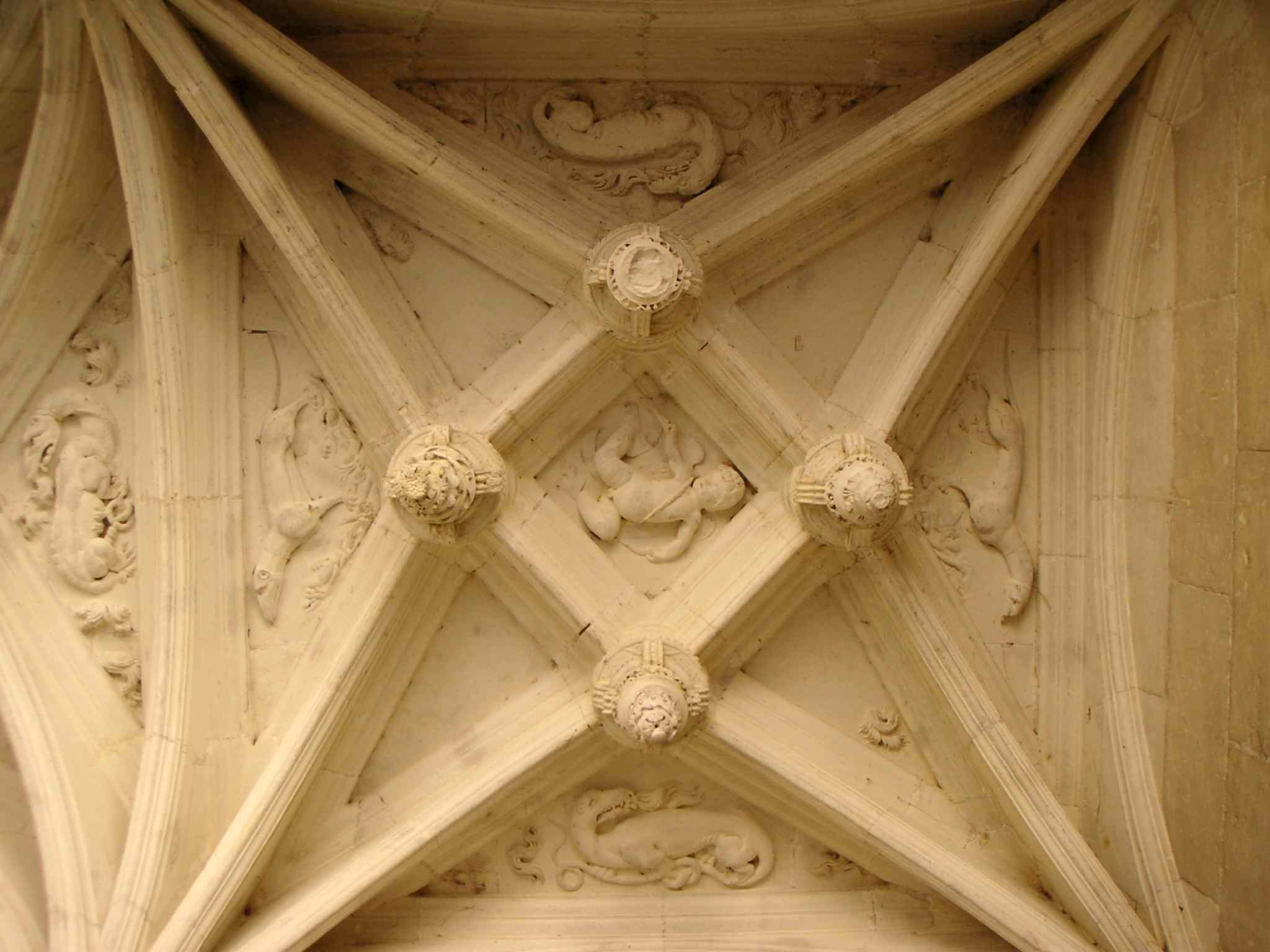 Sculpture du plafond de la Loggia du grand escalier du château d'Azay-le-rideau (France)